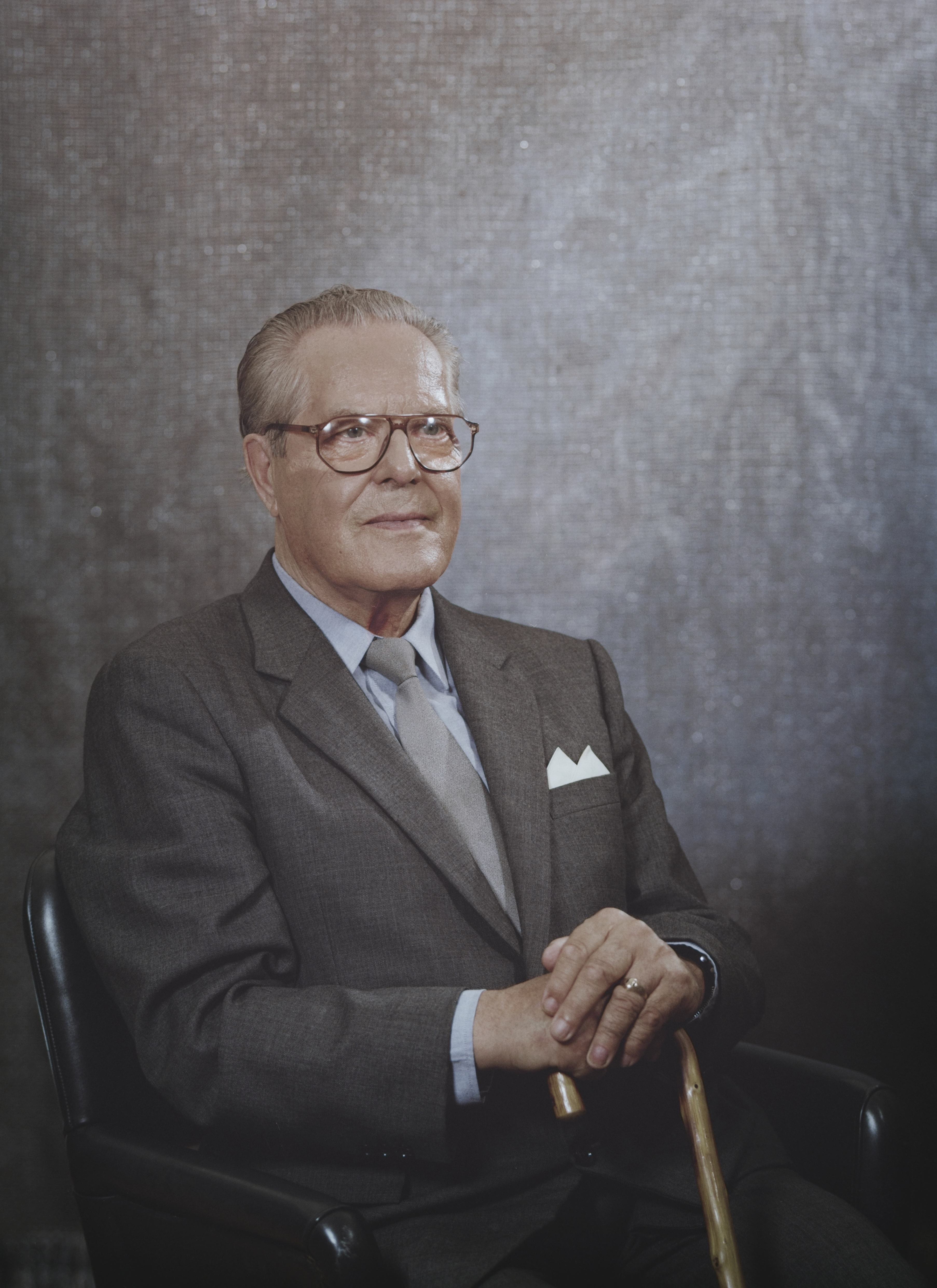 Urheilujohtaja, agronomi Reino Piirto (1913–1999).